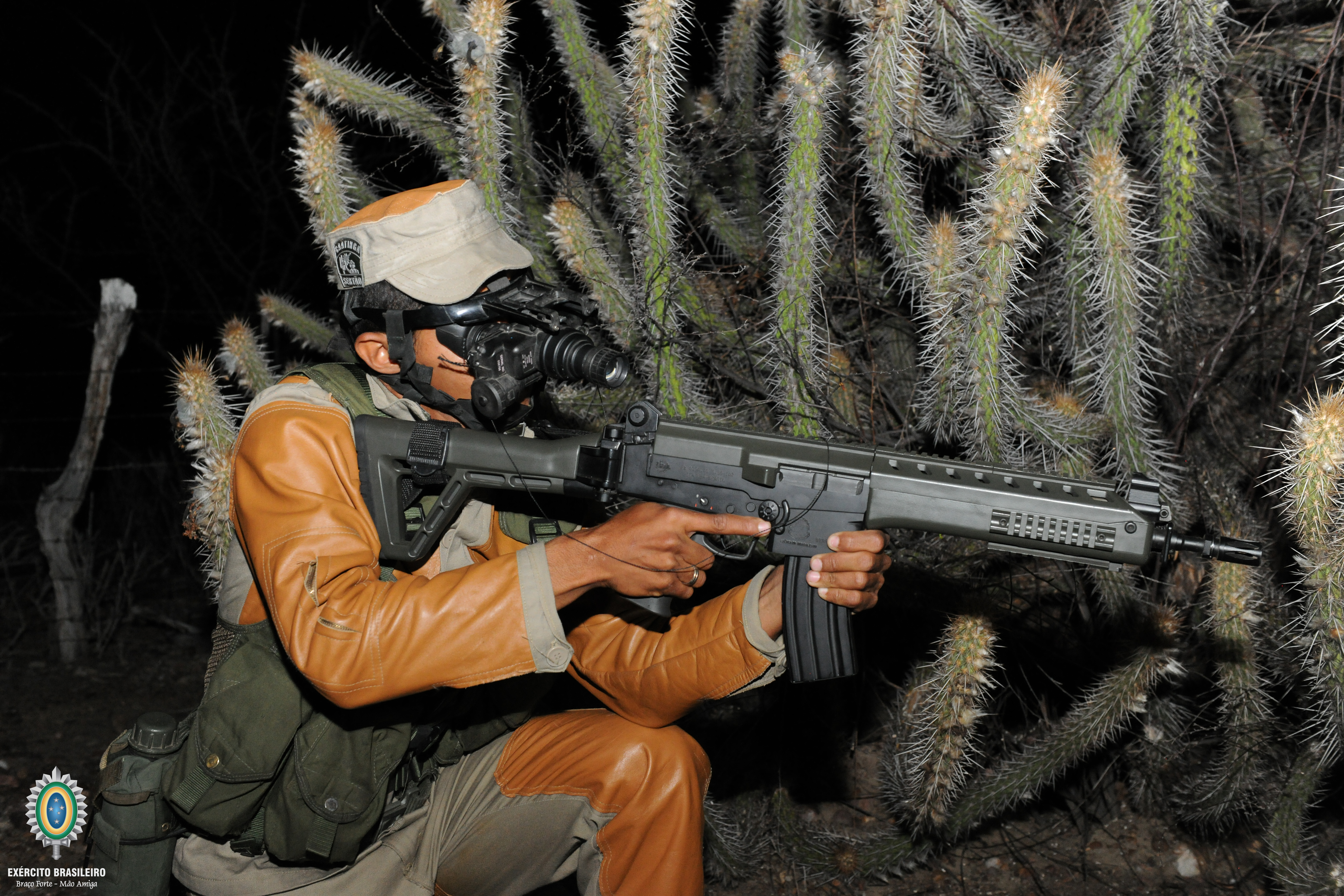 Foto: Ten Edvaldo/EB